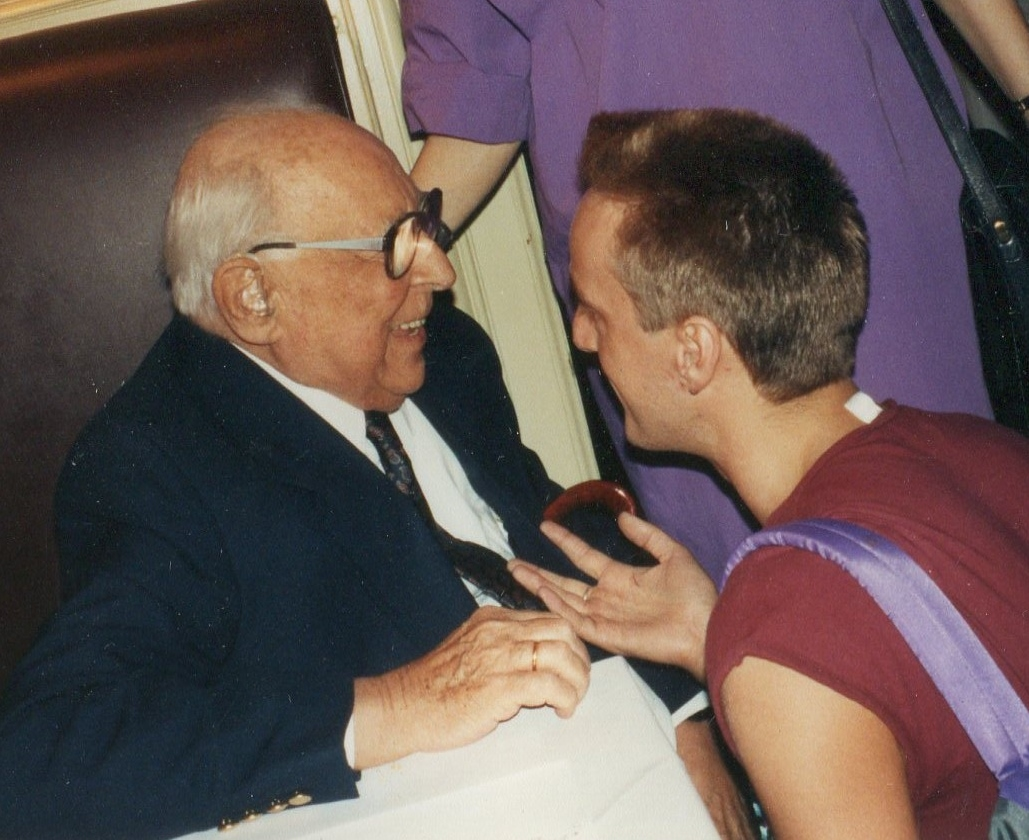 Schriftsteller Hans Sahl mit Fan vor der Lesung im Hamburger Literaturhaus